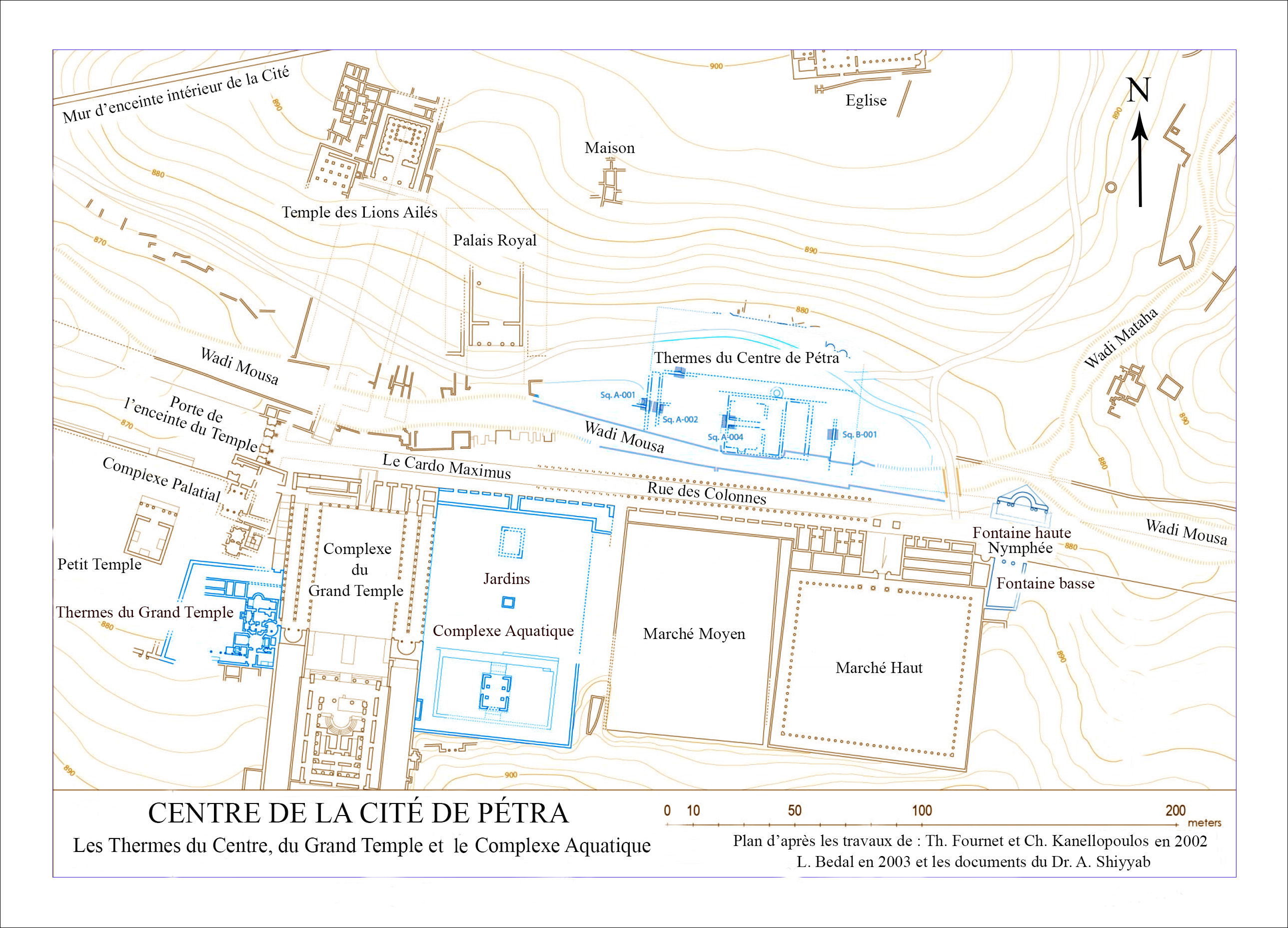 Les thermes du Centre, du Grand Temple et du Complexe Aquatique de Pétra.